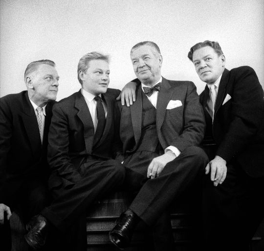 Nummisuutarin Eskon esittäjiä: Valentin Vaala, Martti Kuningas, Axel Slangus ja Unto Salminen.